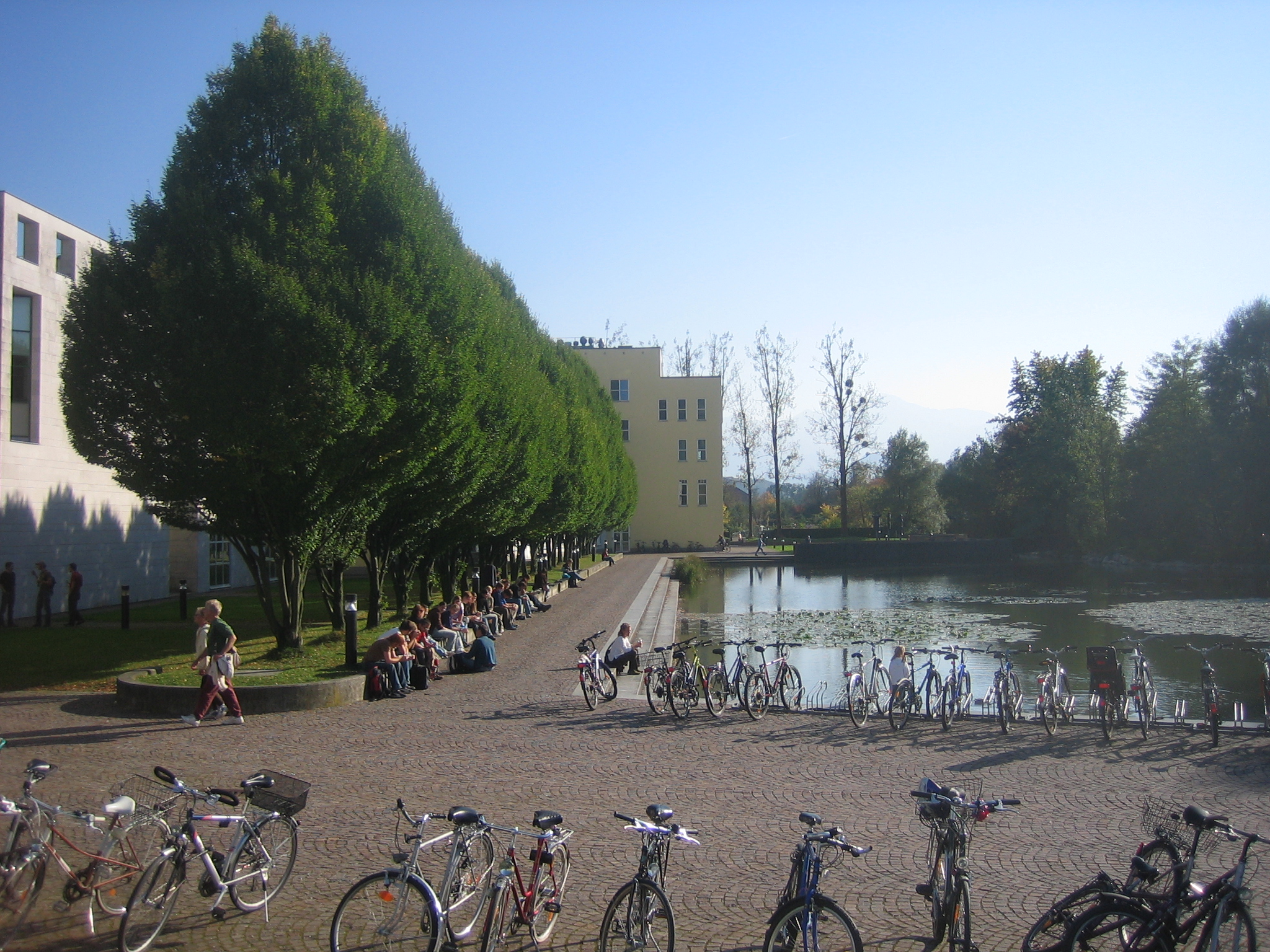 Selber aufgenommen.